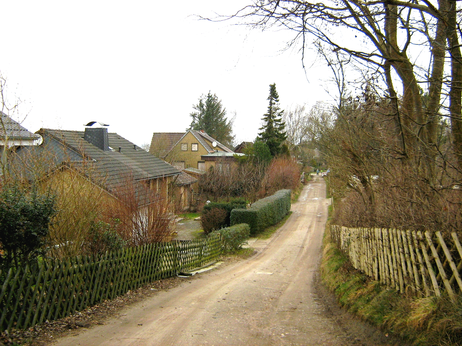 Deichweg (Wanderweg hinter dem Leuchtturm in Schausende)